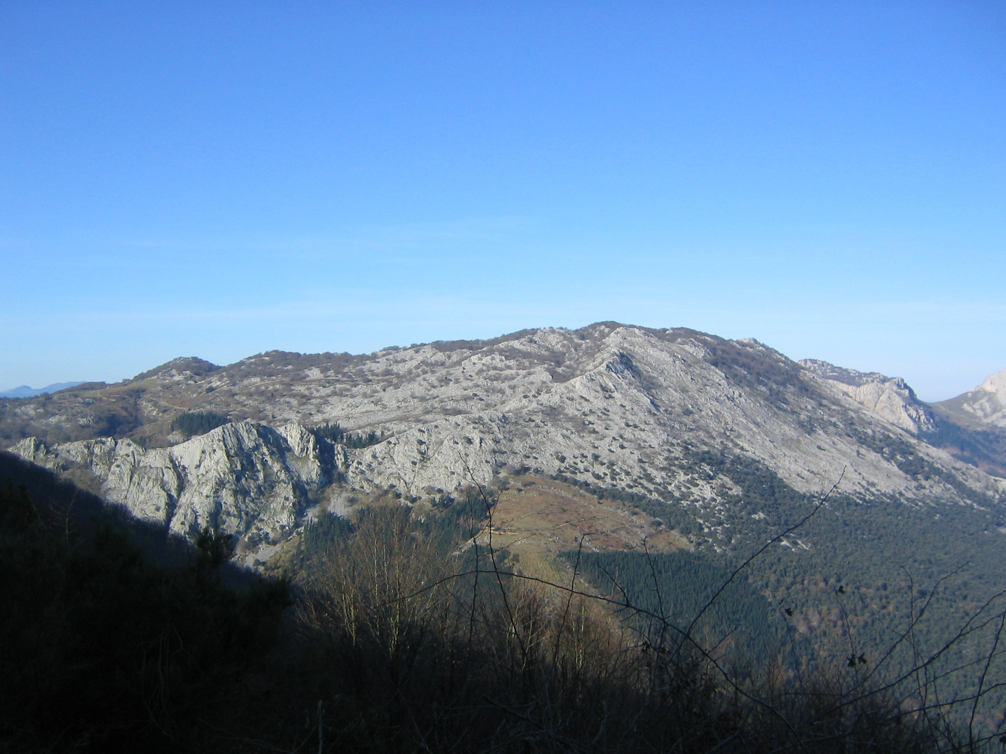 Monte Arrietabaso Vizcaya, País Vasco, España.